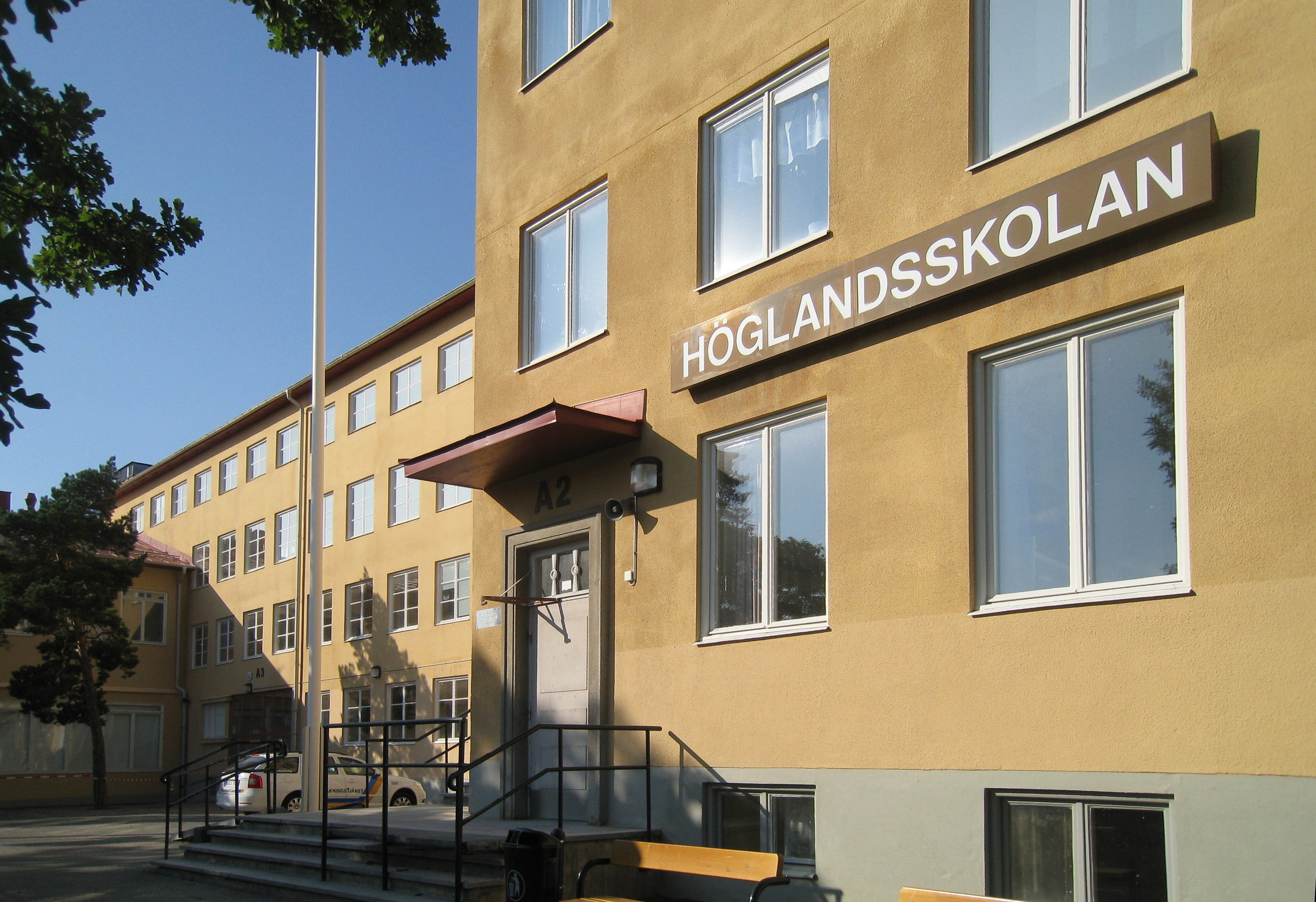 Höglandsskolan vid Höglandet, ingång A2. Höglandsskolan är byggd i funktionalistisk stil och uppförd i etapper 1931-1938 efter ritningar av arkitekten Gustaf Birch-Lindgren (1892-1969).